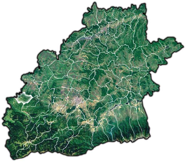 Poiana Sibiului jud Sibiu